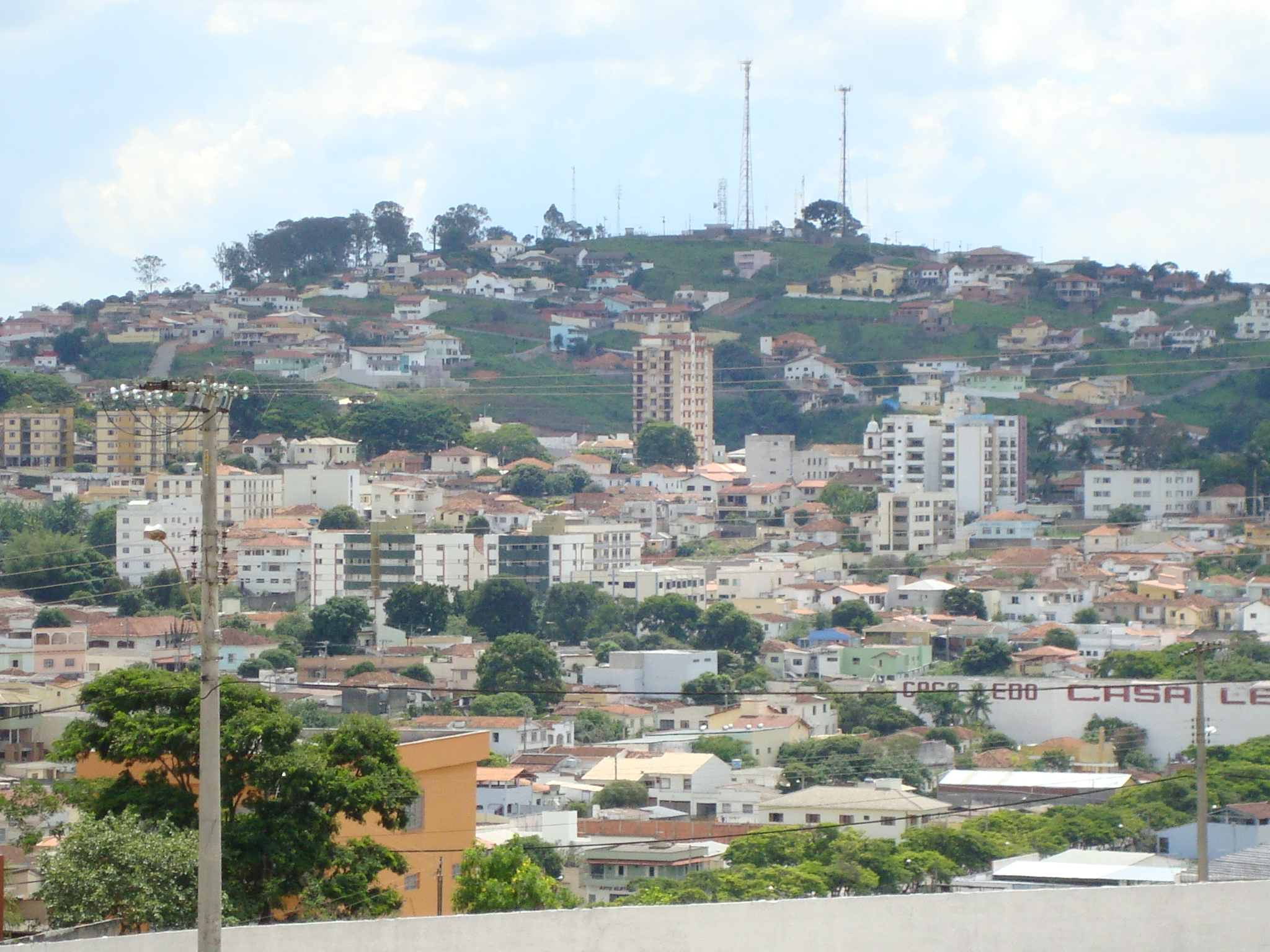 vista de campo belo